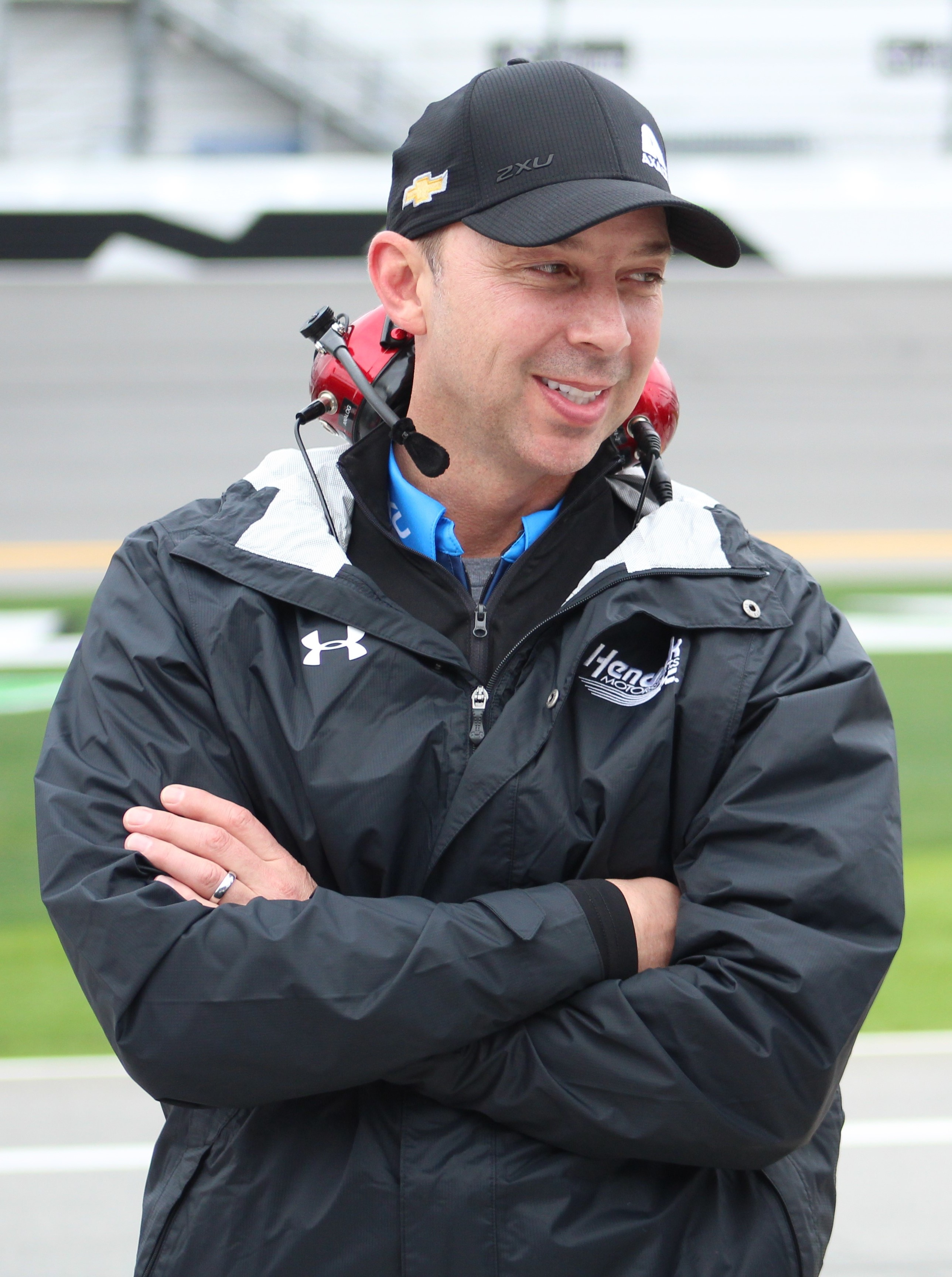 2019 Daytona 500